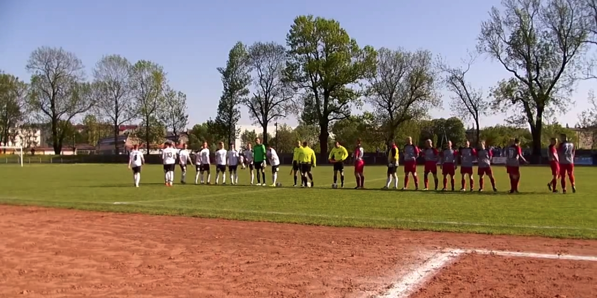 Mecz piłkarski Pogoni Prudnik z LZS Racławiczki rozegrany 5 maja 2018.